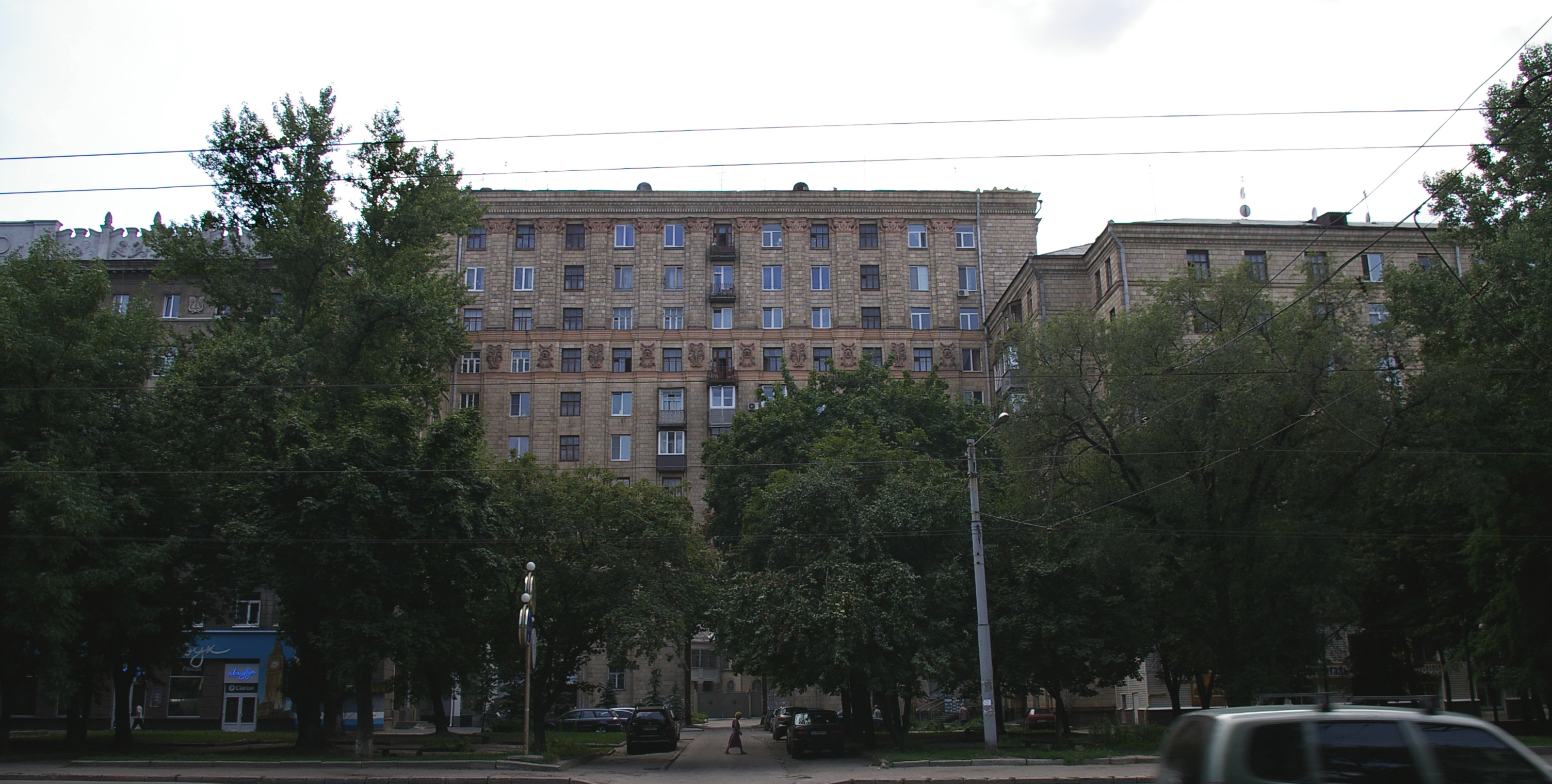 Харьков